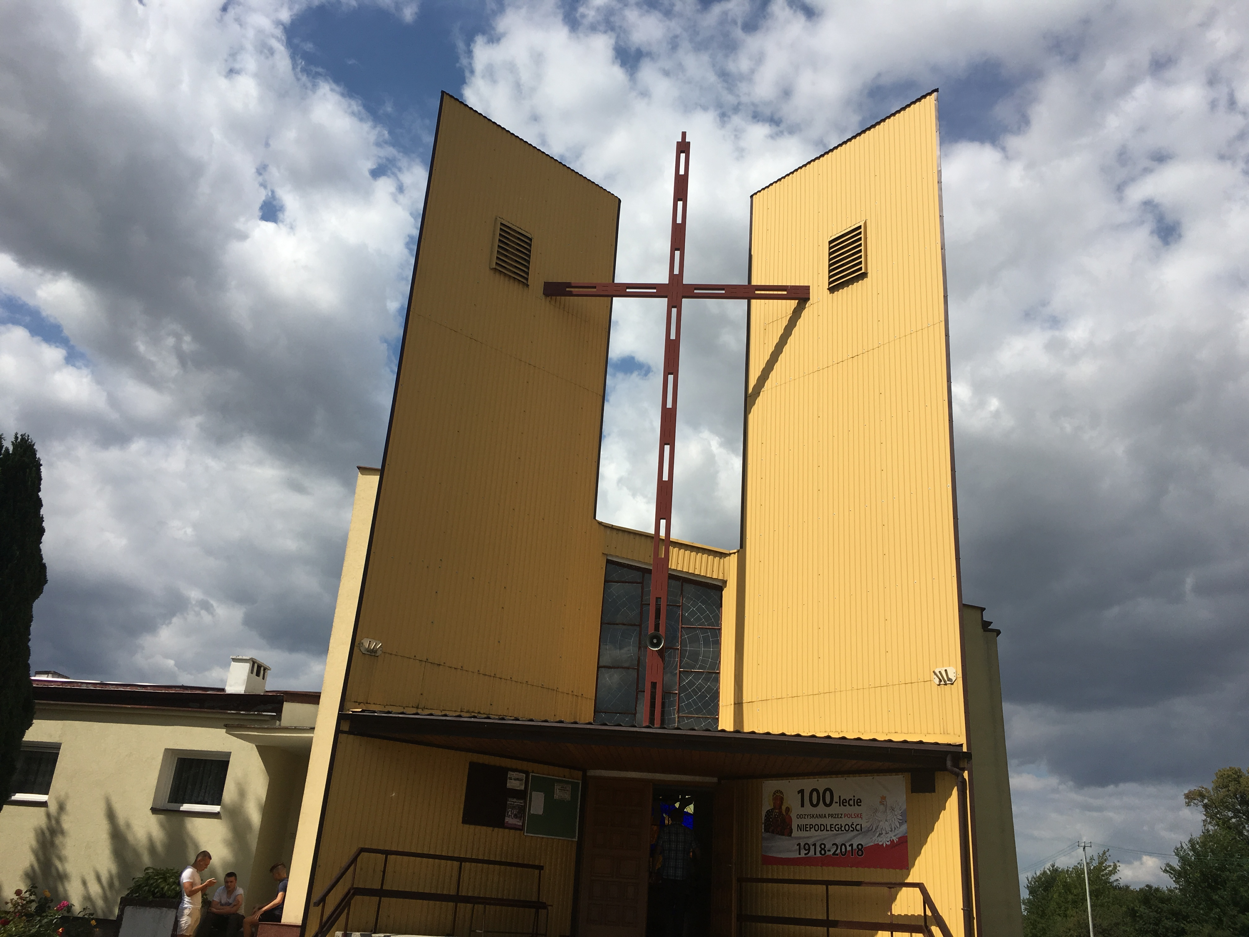 Kościół św. Floriana w Szymankowie